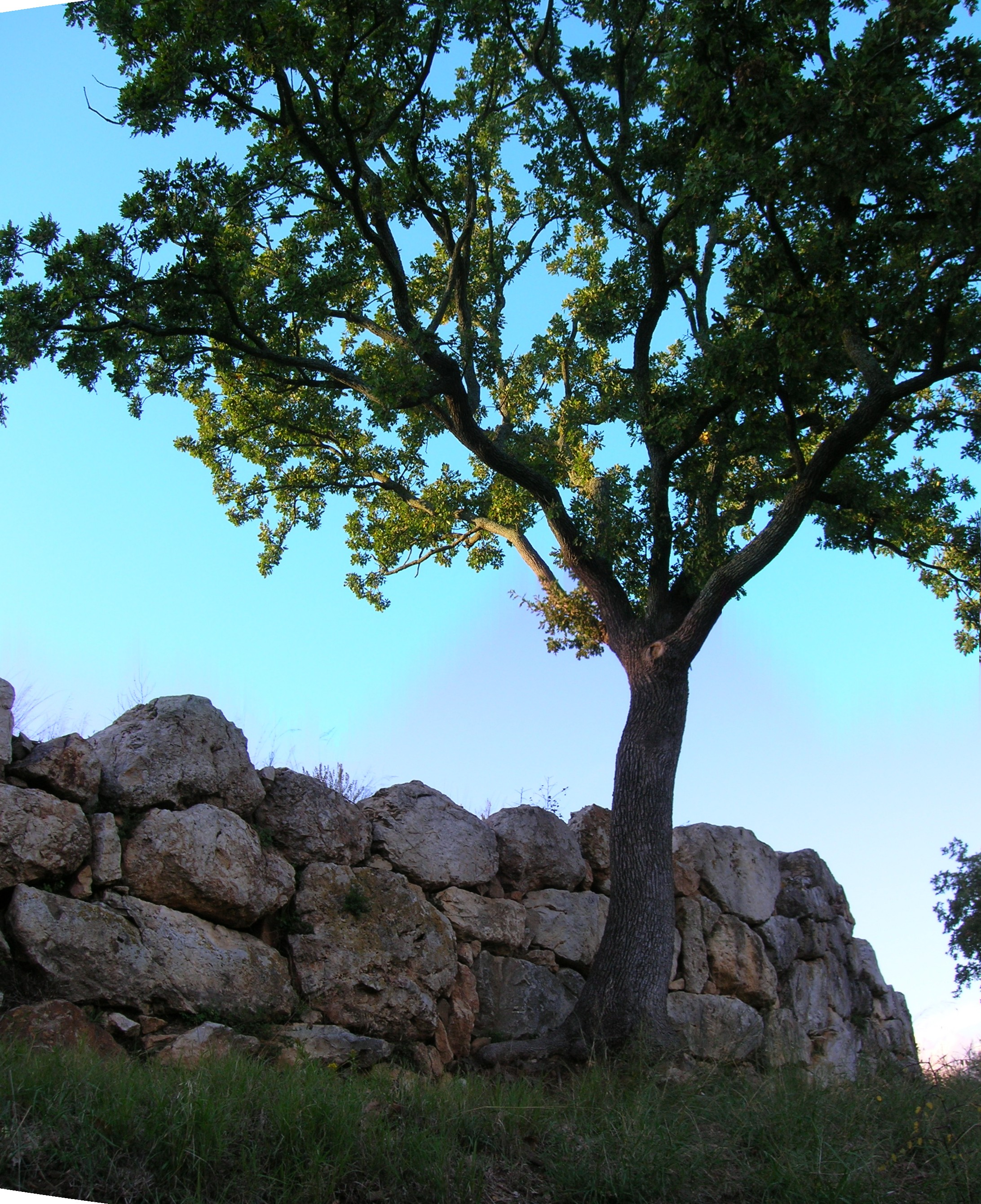 mura etrusche, sito archeologico Roselle, provincia di Grosseto, Toscana, Italia